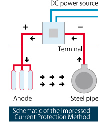 esquema sistema corrente impressa